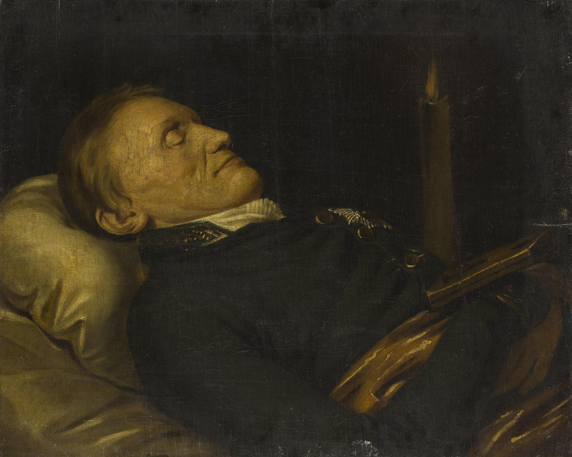 Портрет графа Александра Сергеевича Строганова на смертном одре